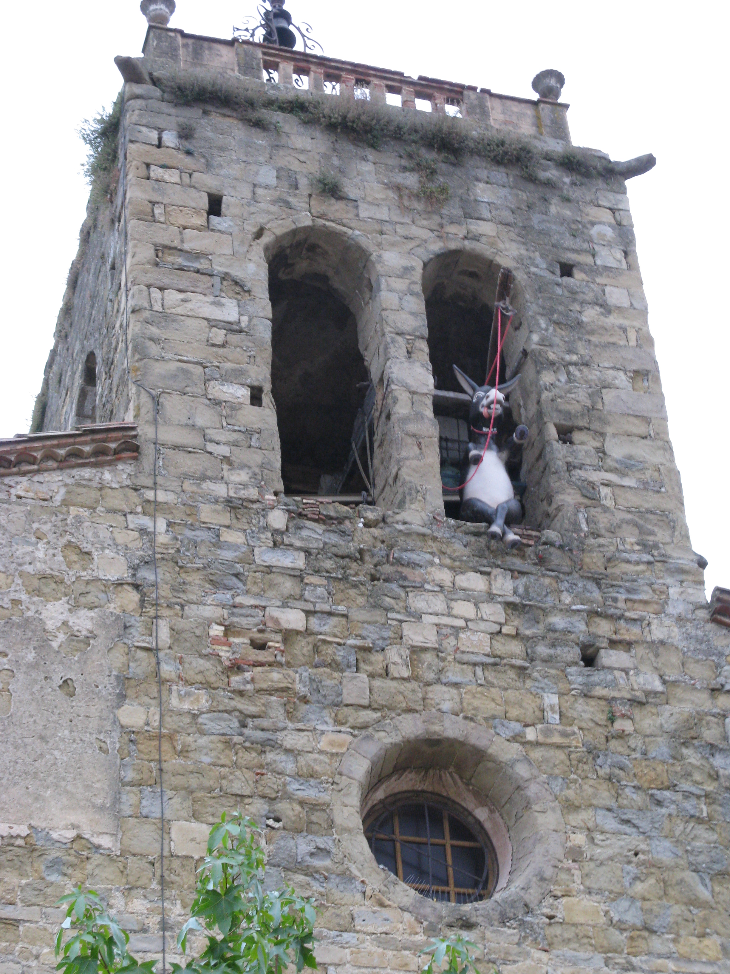 Romanische Kirche "Sant Esteve d'en Bas" (Vals d'en Bas, Nähe Olot, Katalonien, Spanien) - Man beachte den Esel im Geläut, der während des Dorffestes dort positioniert wird.